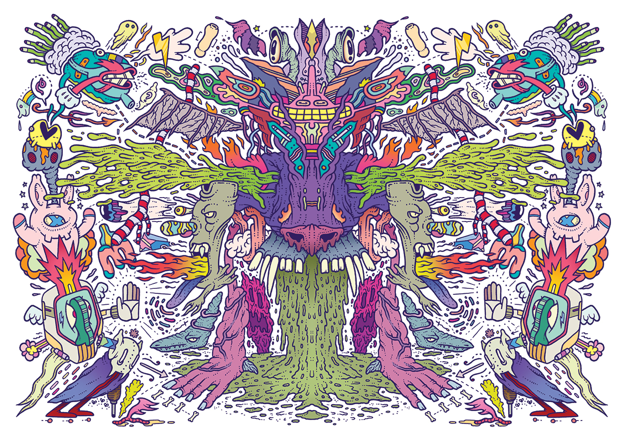 Obra de Diego Medina, nanquim e recursos digitais, 30 x 21 cm